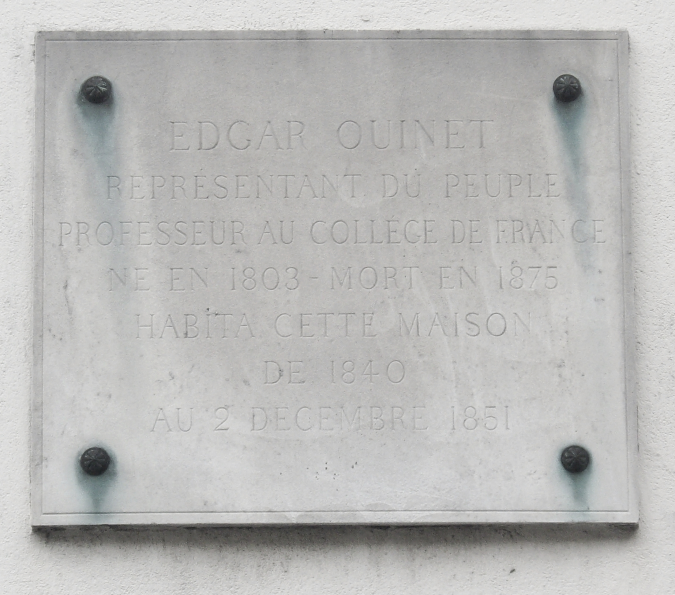 Plaque apposée au n° 32 de le rue du Montparnasse, Paris 6e, où habita l'historien et écrivain Edgar Quinet (1803-1875) de 1840 au 2 décembre 1851.